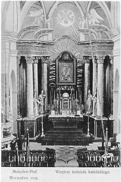 Ołtarz główny w kościele pod wezwaniem Najświętszej Marii Panny - Mohylów Podolski. Kościół został wysadzony przez Rosjan-bolszewików około 1937 roku.